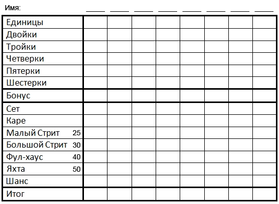 Пример таблицы для подсчёта очков в игре Яхта.